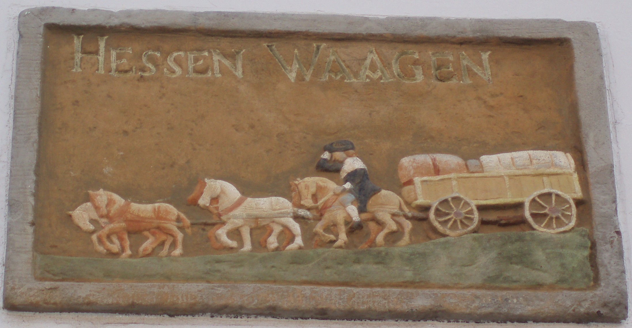 Gevelsteen in de Thomas a Kempisstraat in Zwolle met daarop afgebeeld een Hessenwagen.